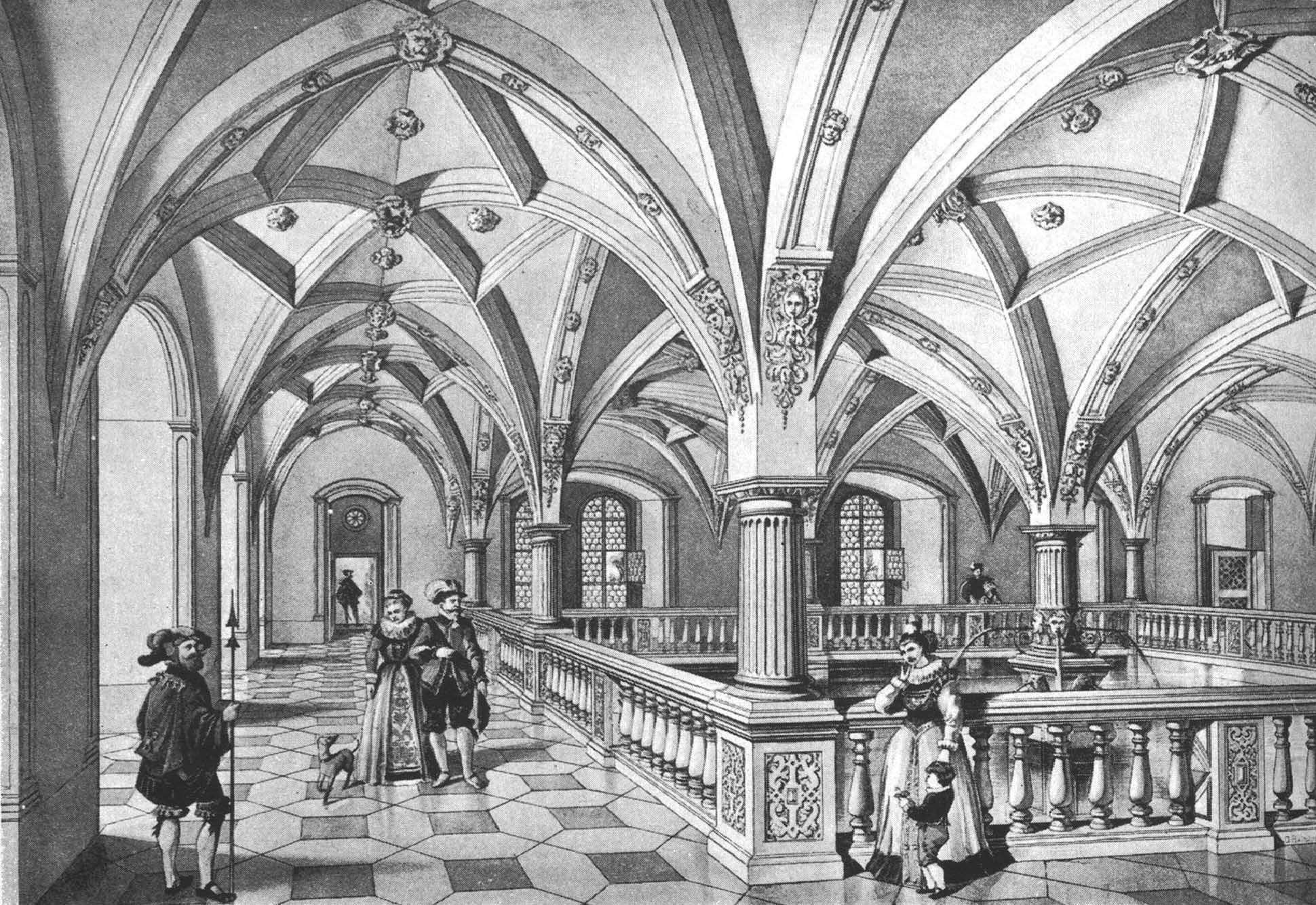 Carl Beisbarth: Innenansicht des Erdgeschosses des Neuen Lusthauses in Stuttgart, Zeichnung.